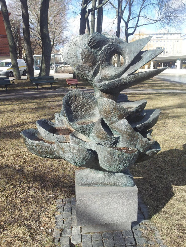 Fågel blå av Tyra Lundgren (1976). Kungsholmen, Klara sjö.